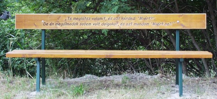 G.B. Shaw-emlékpad, Felsőgöd, Karajos patak